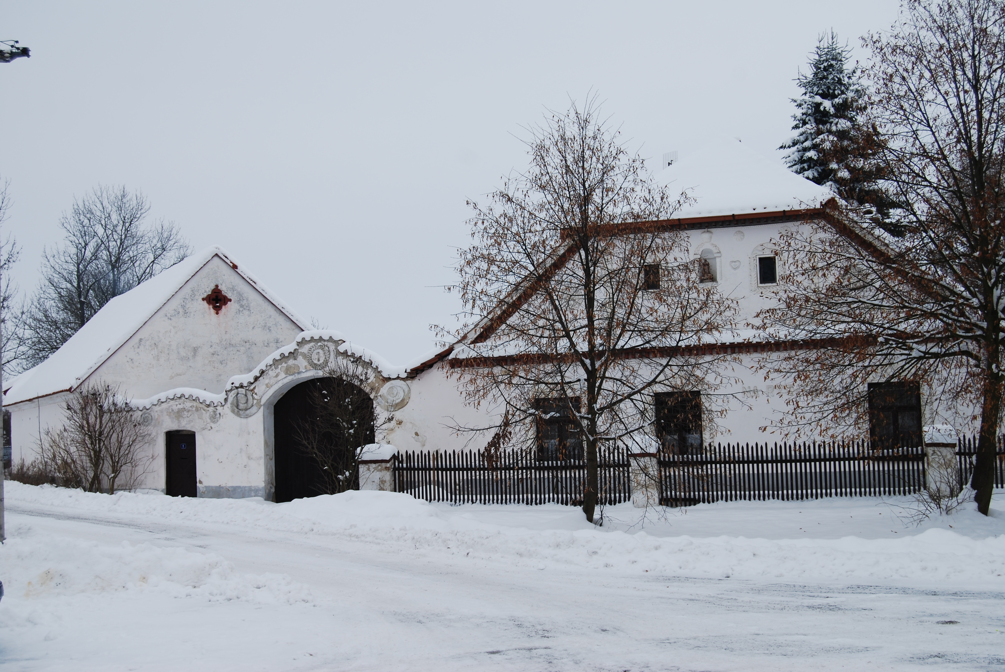 Usedlost ve obci. Dolní Novosedly. Okres Písek. Česká republika.